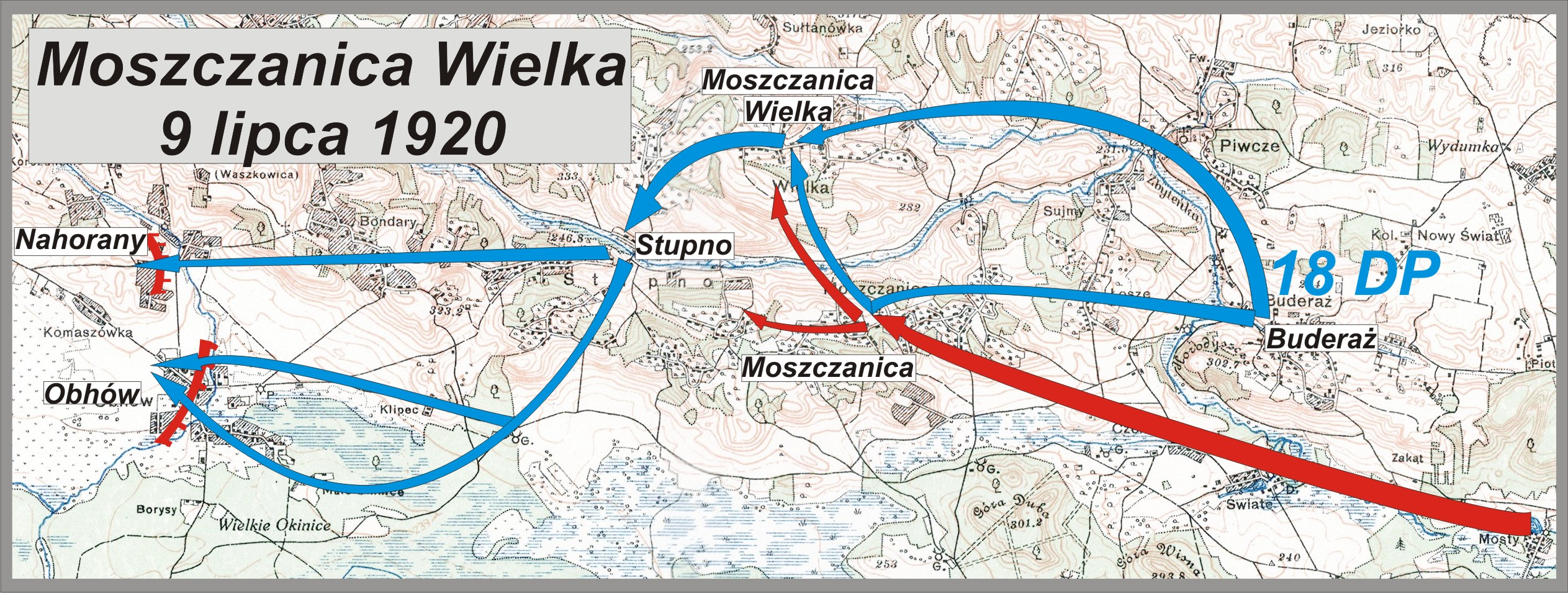 Bitwa pod Moszczanicą 1920